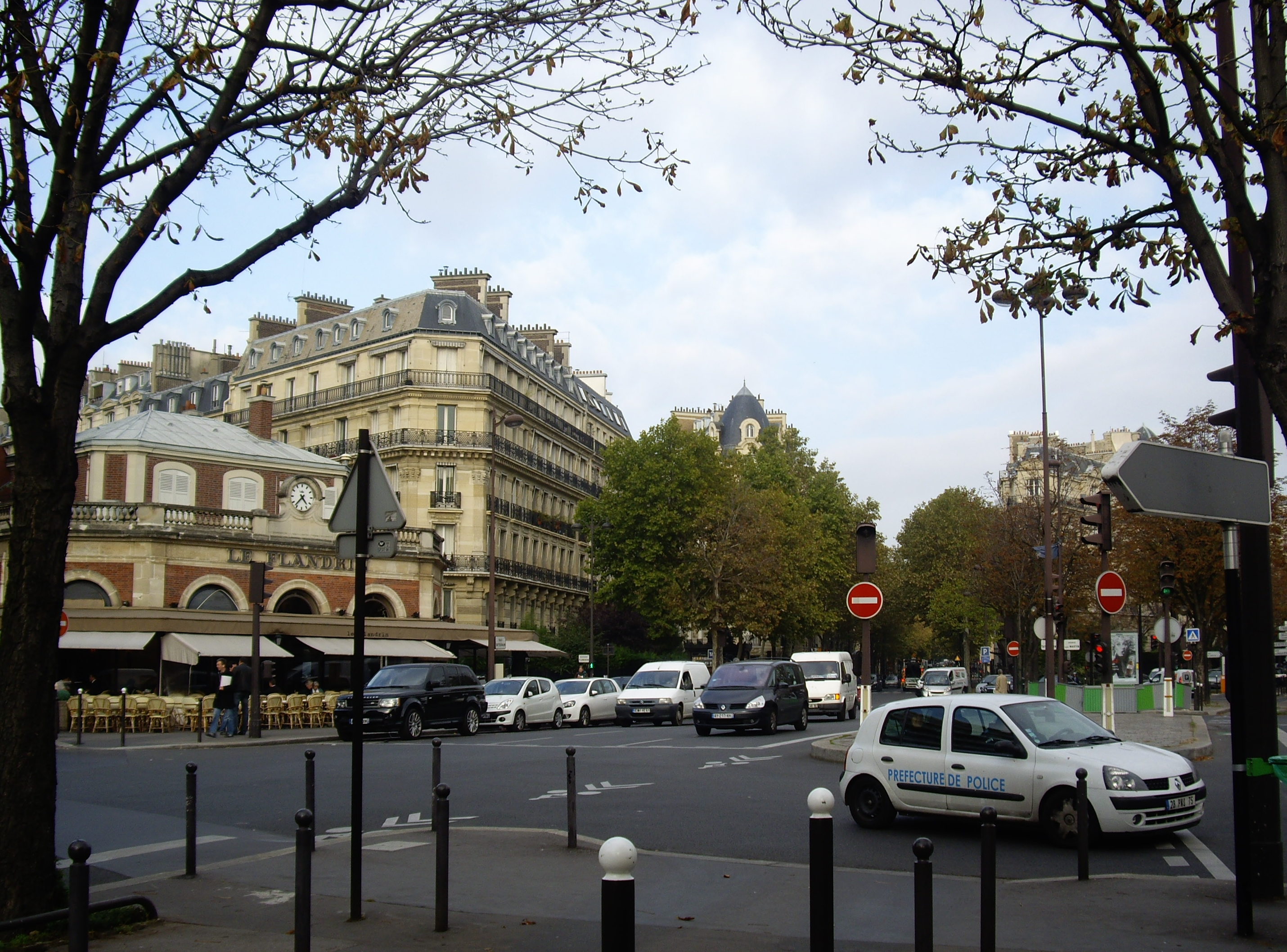 Place Tattegrain, Paris 16e. En diagonale, l'avenue Henri-Martin. Au fond, l'entrée de l'avenue Victor-Hugo. Sur la gauche, encadrant la brasserie, l'entrée du boulevard Flandrin. Sur la droite, l'entrée des boulevards Jules-Sandeau et Émile-Augier.